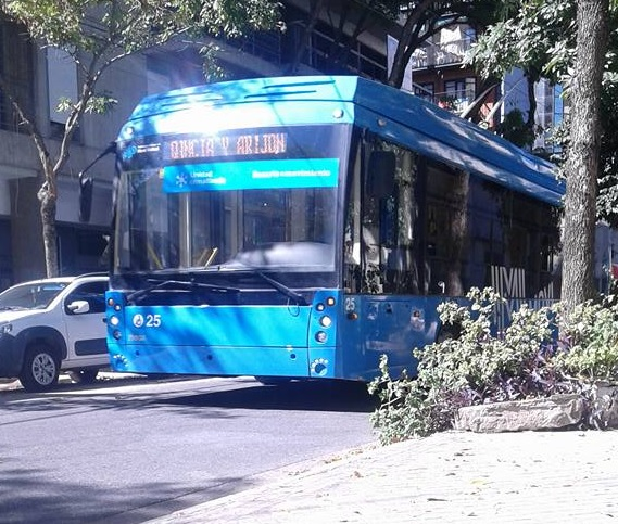 Unidad de la Línea Q de trolebuses de la ciudad de Rosario.